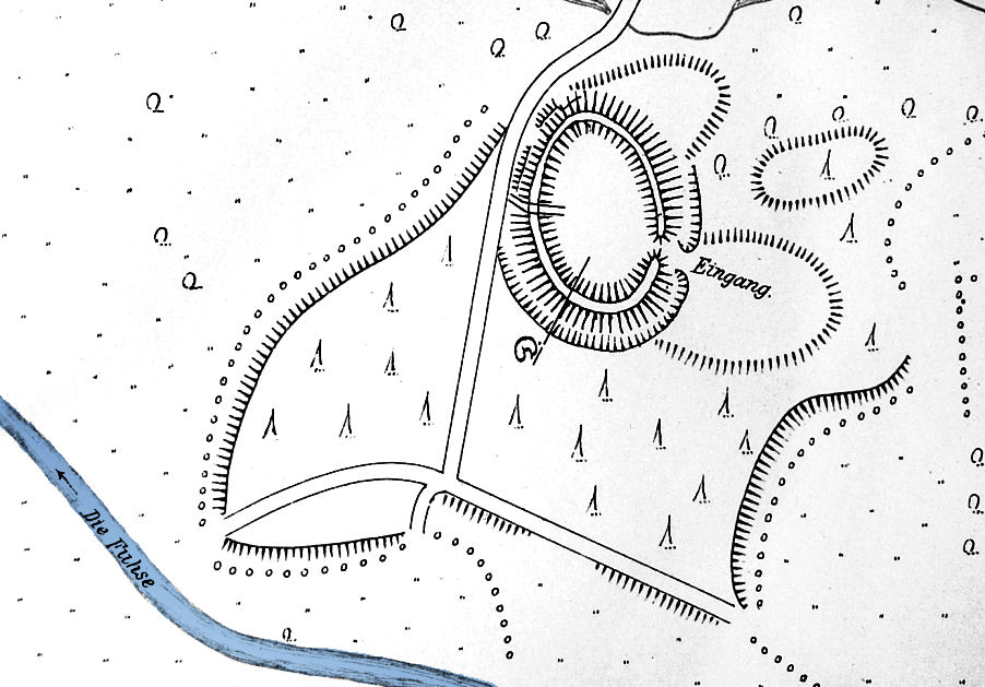 Lageplan des Ringwall von Burg von Carl Schuchardt